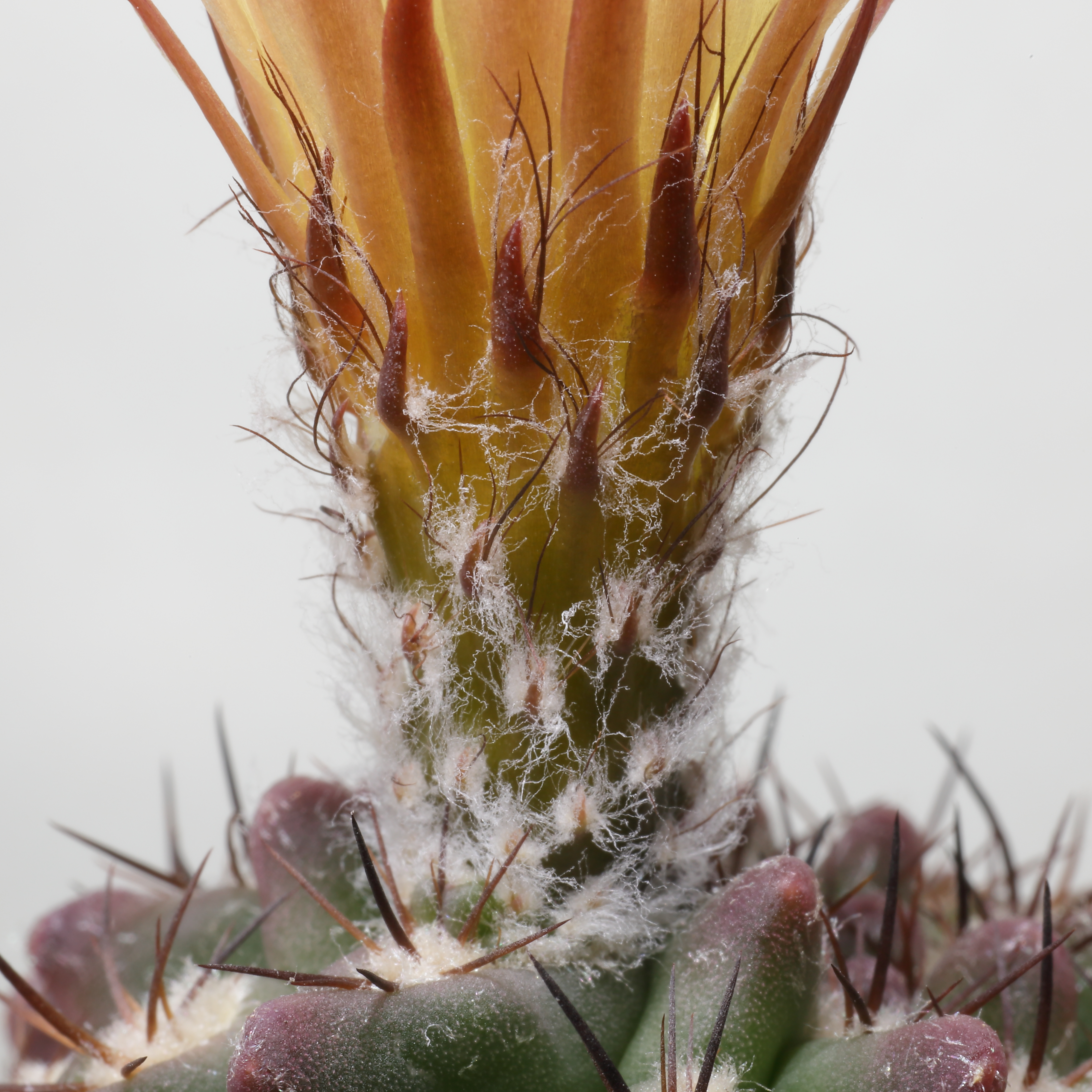 Hypanthium på en Eriosyce recondita.